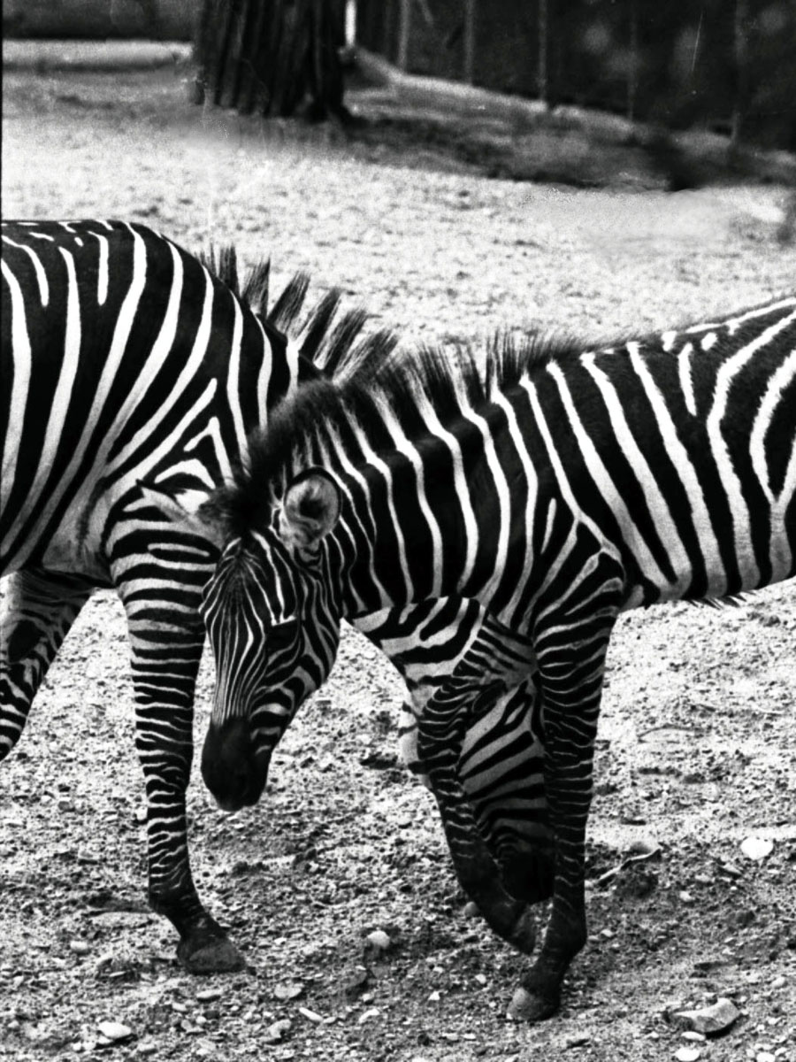 Zebra in Dallas Zoo, 1974Yipes stripes!